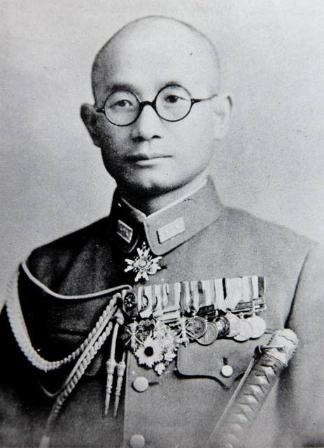 辻政信,Tuji Masanobu